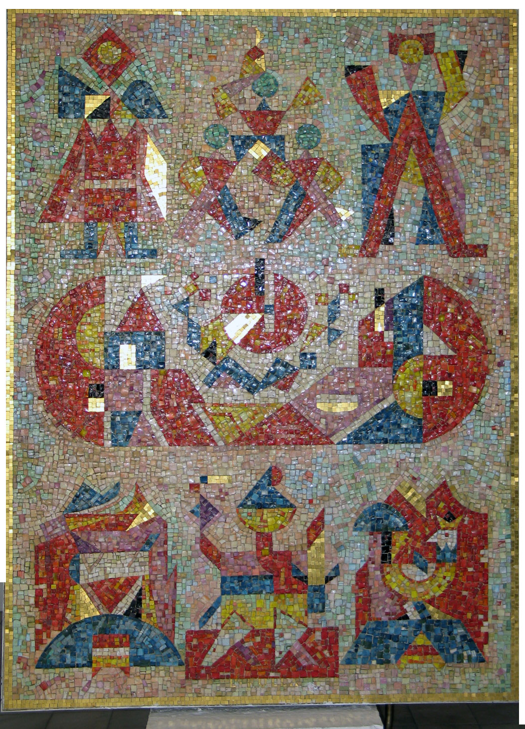 Mozaika verejne dostupná v Galérii Ľudovíta Fullu